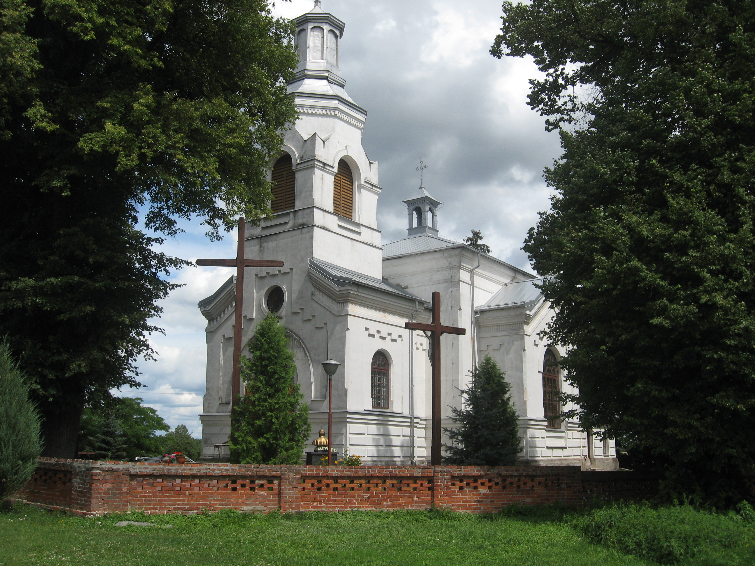 Kościół w Chłopkowie